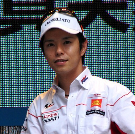 foto Nakano